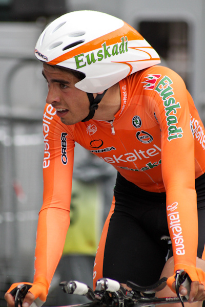 Prologue du Critérium du Dauphiné 2011, Saint Jean de Maurienne